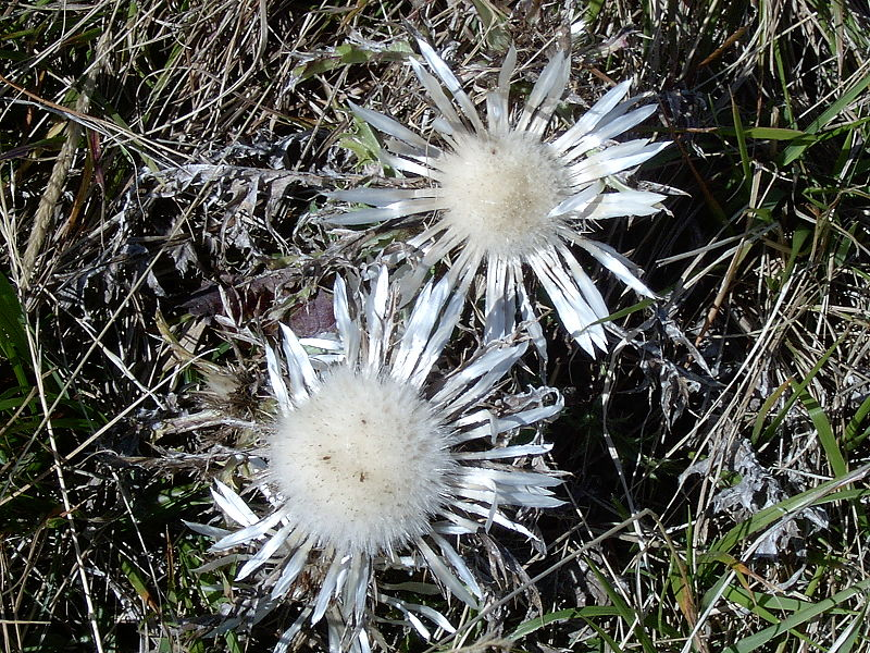 Esemplari di cardo Carlina sp.